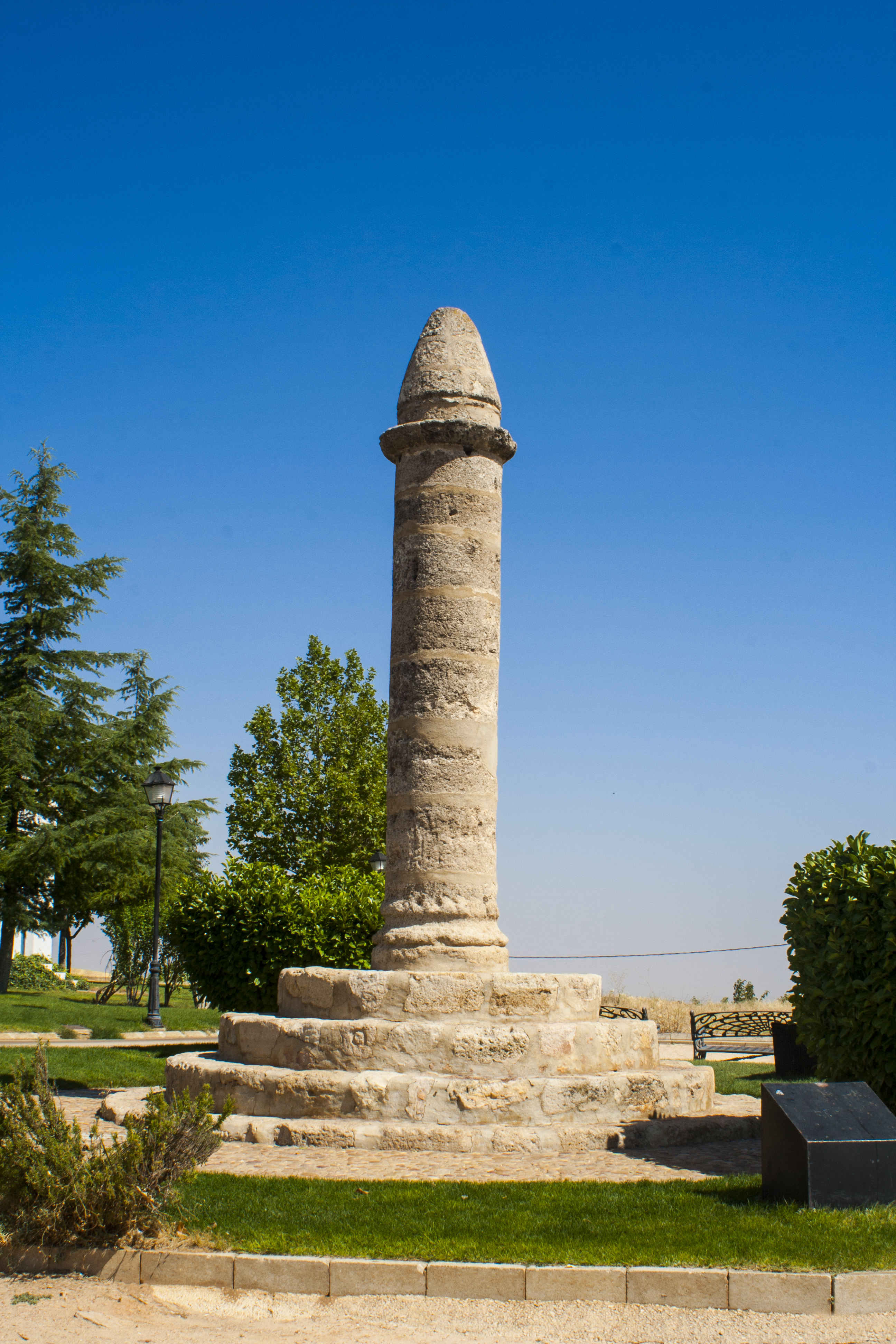 Pcota del Bonillo